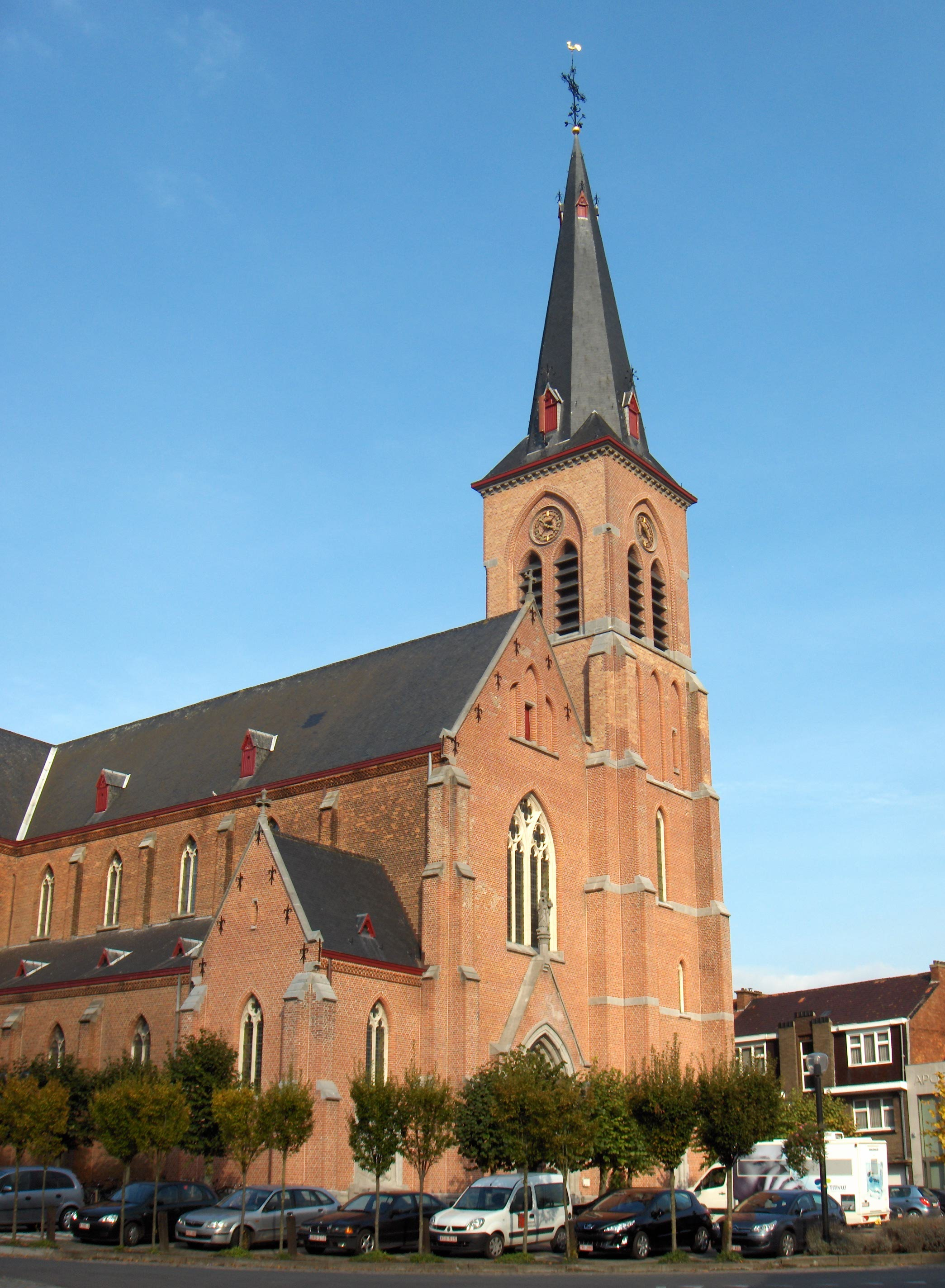 Knesselare (Belgien, Provinz Ostflandern), Willibrordikirche in der Dorfmitte